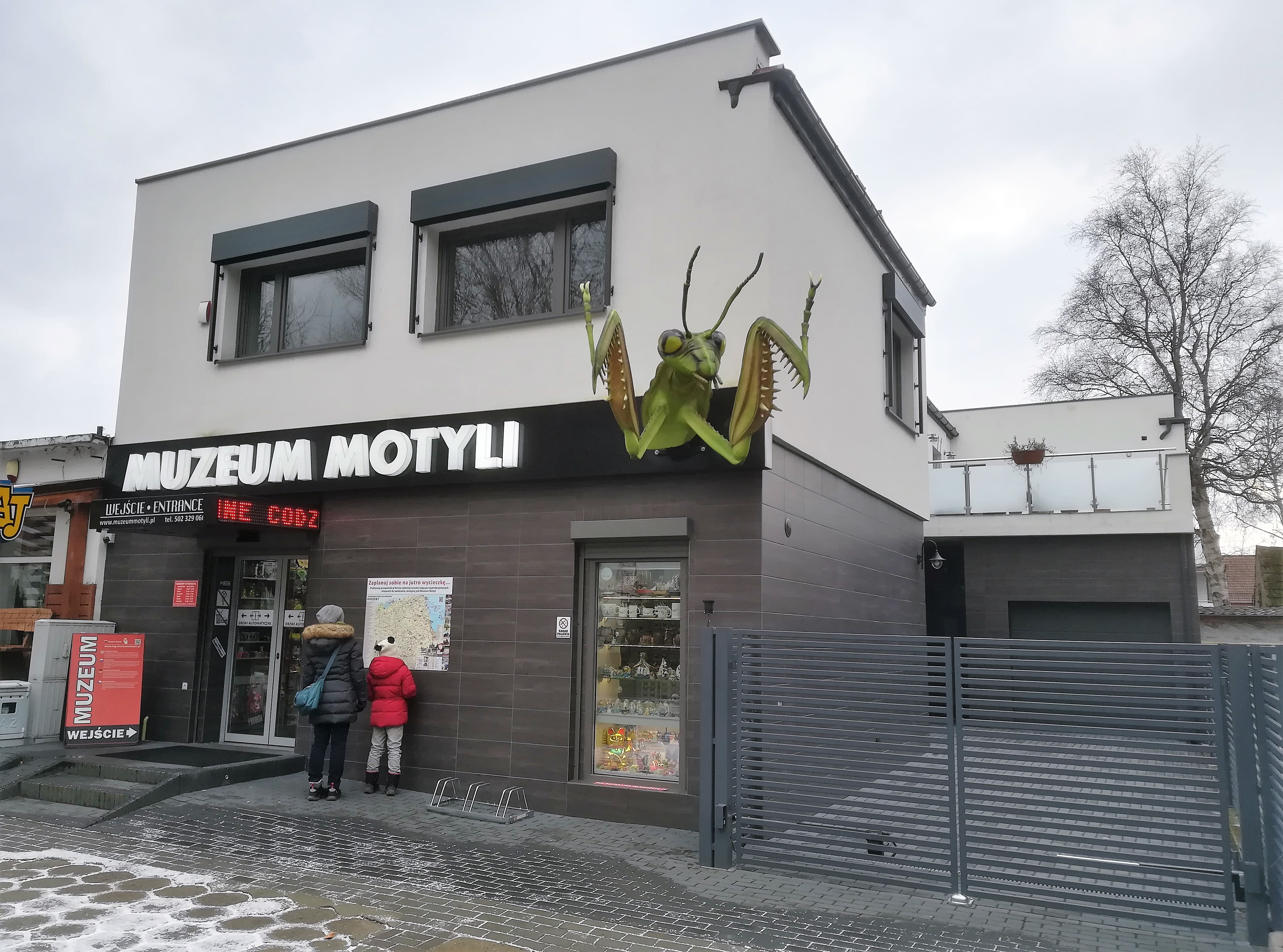 Muzeum Motyli w Łebie.